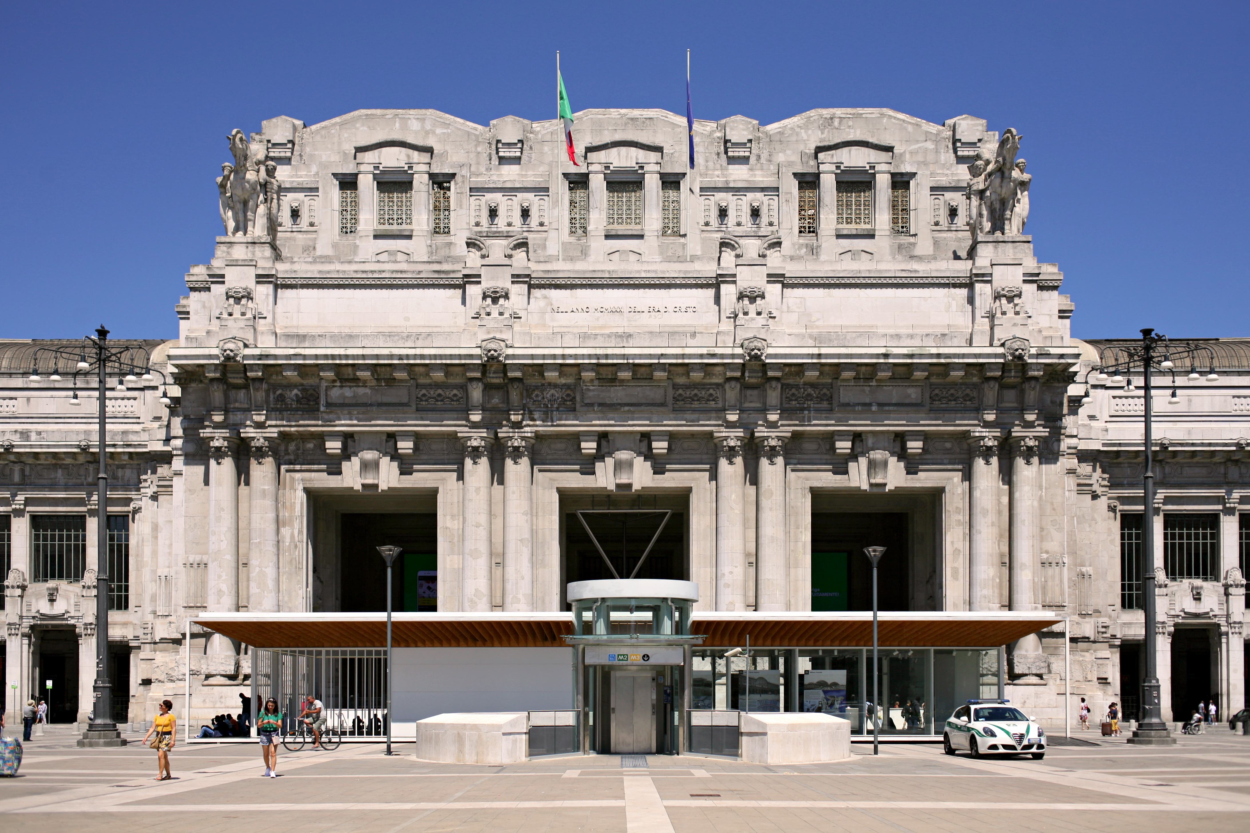 Facciata dela Stazione Centrale di Milano nel 2016